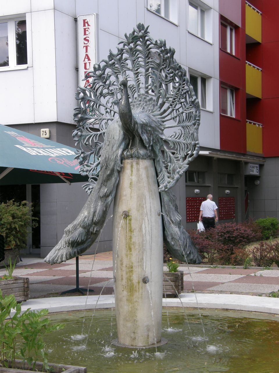 Margit Schötschel-Gabriel: Pfauenbrunnen. 1979, Bronze. Holzmarktstraße, Nähe Alexanderstraße, Berlin-Mitte